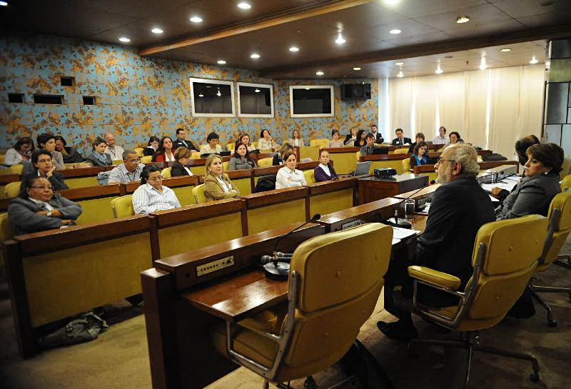 Brasília - Oficina debate a Política Nacional de Segurança Alimentar e Nutricional e o Sistema Nacional de Segurança Alimentar e Nutricional.